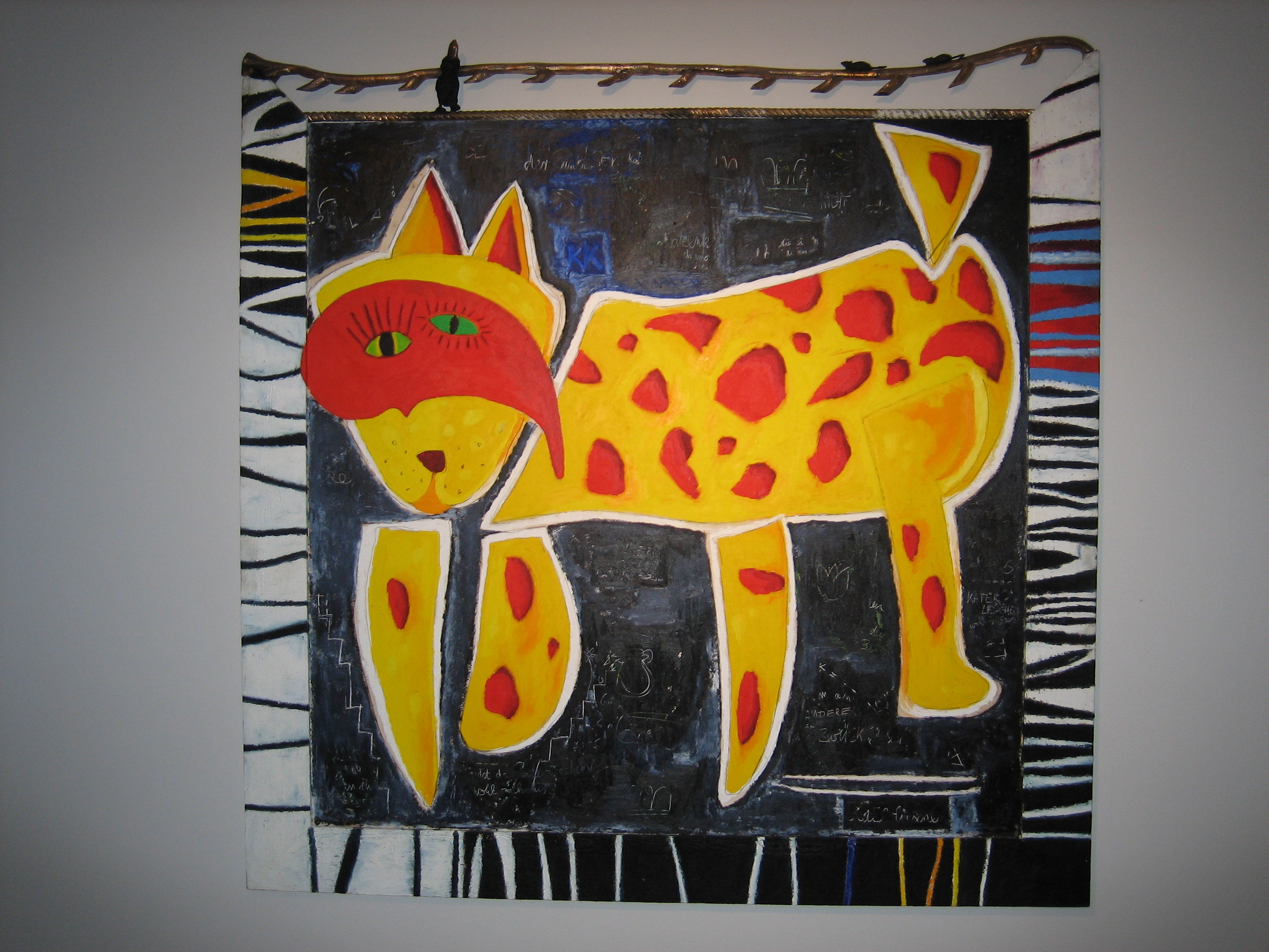 Katerlischen, Öl und Bronze auf Holz, 1,78x1,76m, 2005